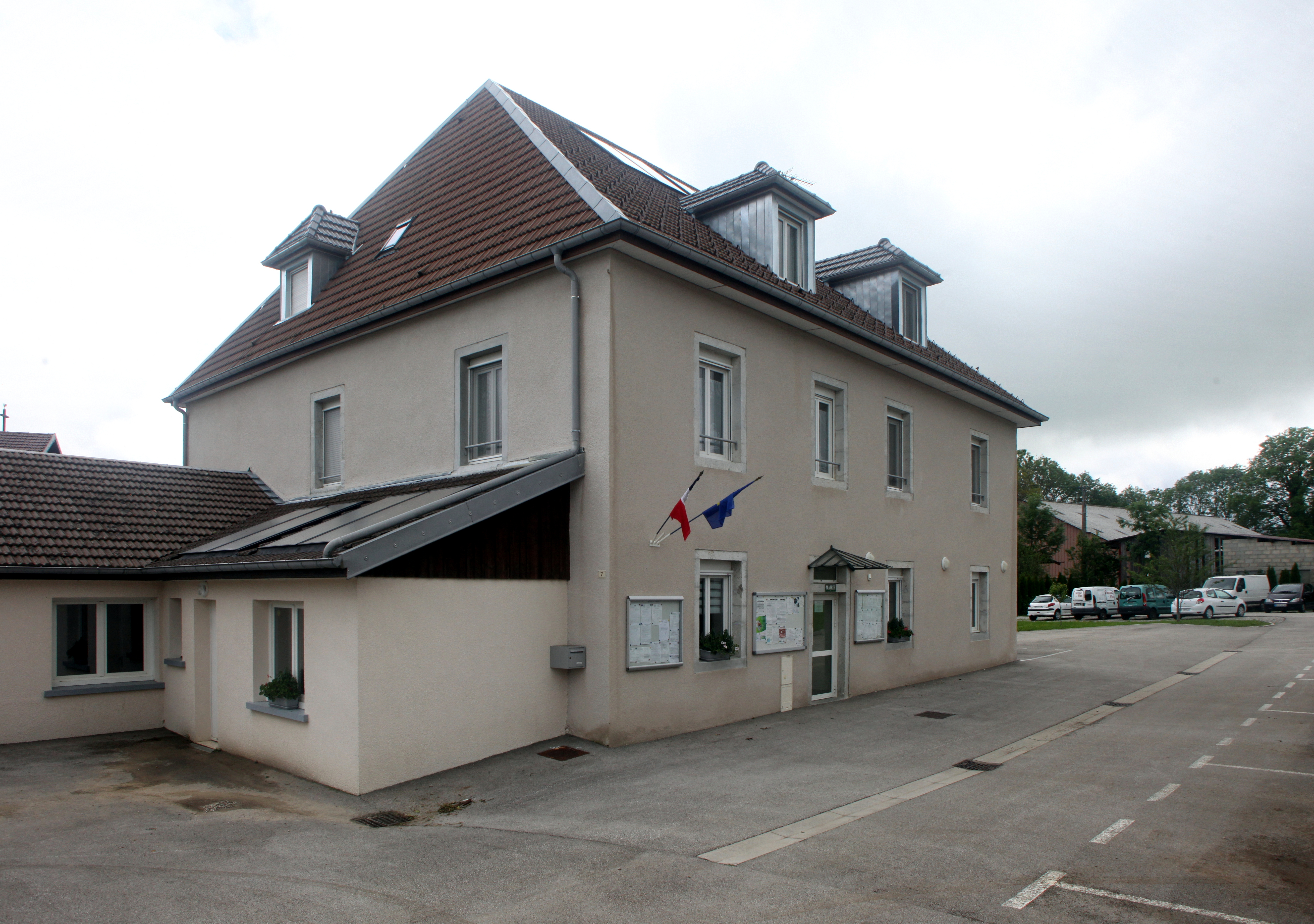 Mairie de Fallerans (Doubs).